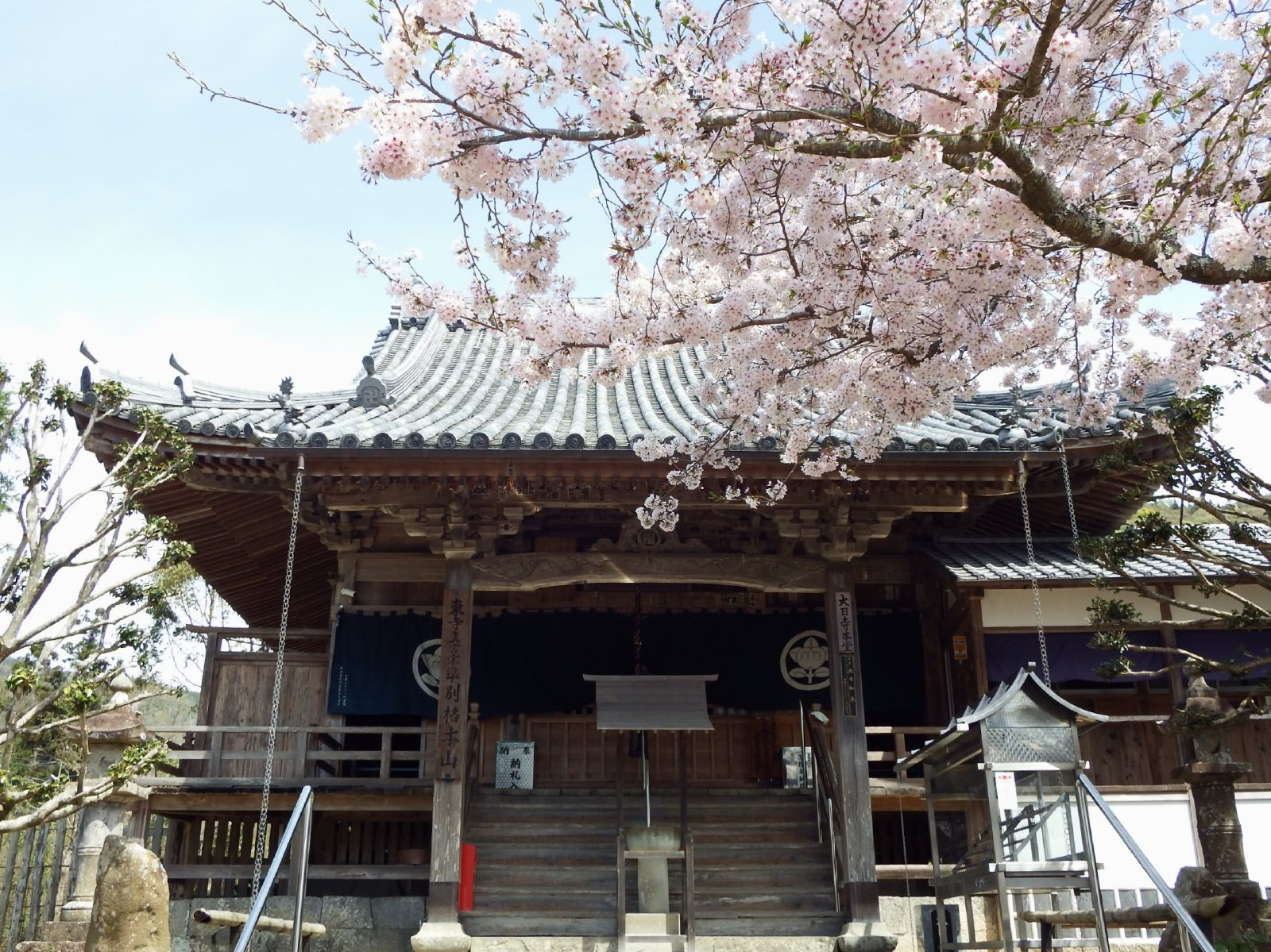 大日寺の本堂